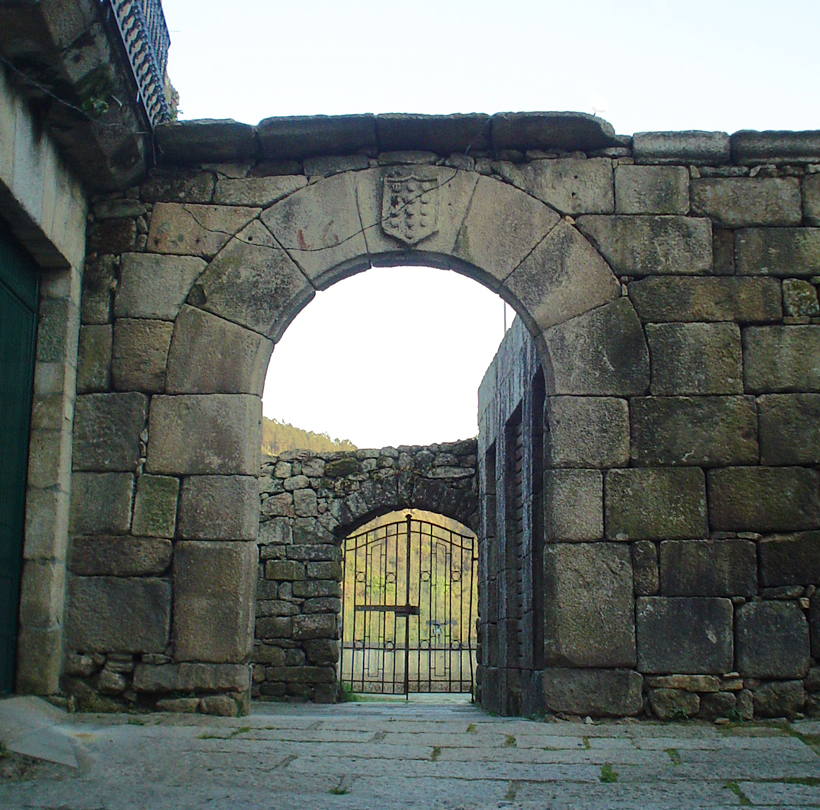 Entrada auxiliar do Castelo de Ribadavia co escudo do Sarmiento